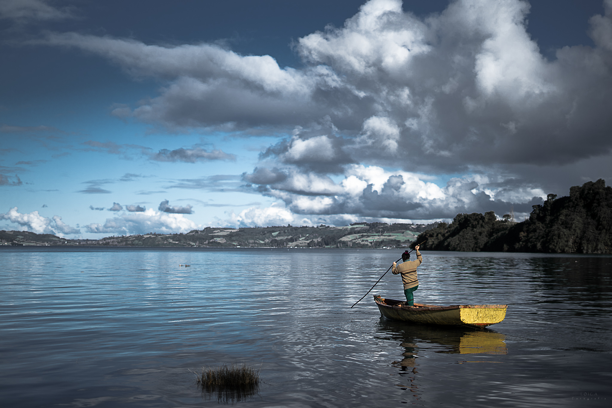 Parque nacional Chiloé Durante muchos años el pueblo chilote ha estado en constante movilización por el hecho de la contaminación del mar. Producto de la sobre explotación de las salmoneras y el NO cuidado de ellas. Afectando así misma al hábitat total marino ( flora y fauna marina ), causando así un gigantesco daño al ambiente con pérdidas de ciento de especies afectadas.